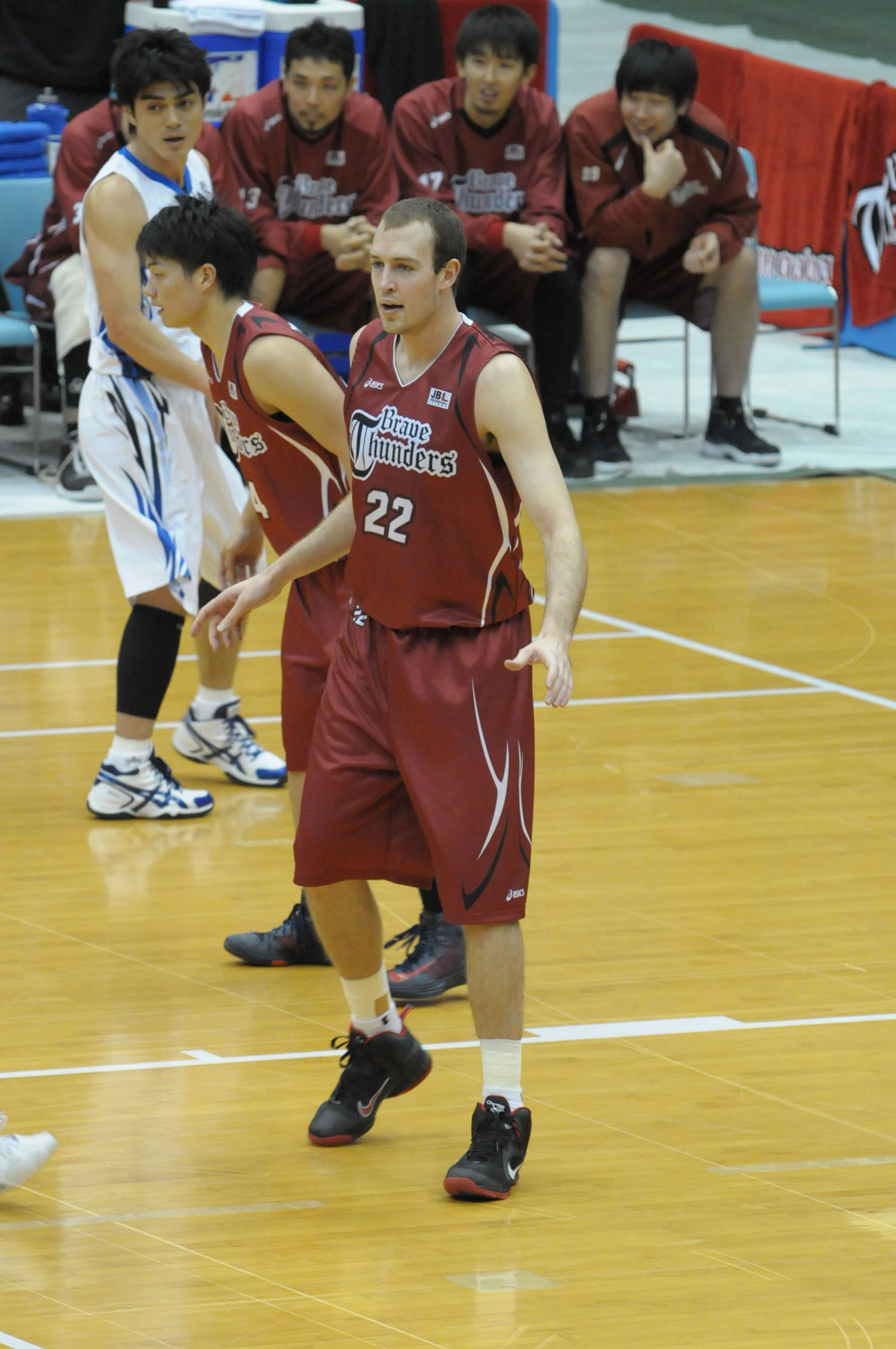 東芝ブレイブサンダース、ニック・ファジーカス選手。とどろきアリーナで。